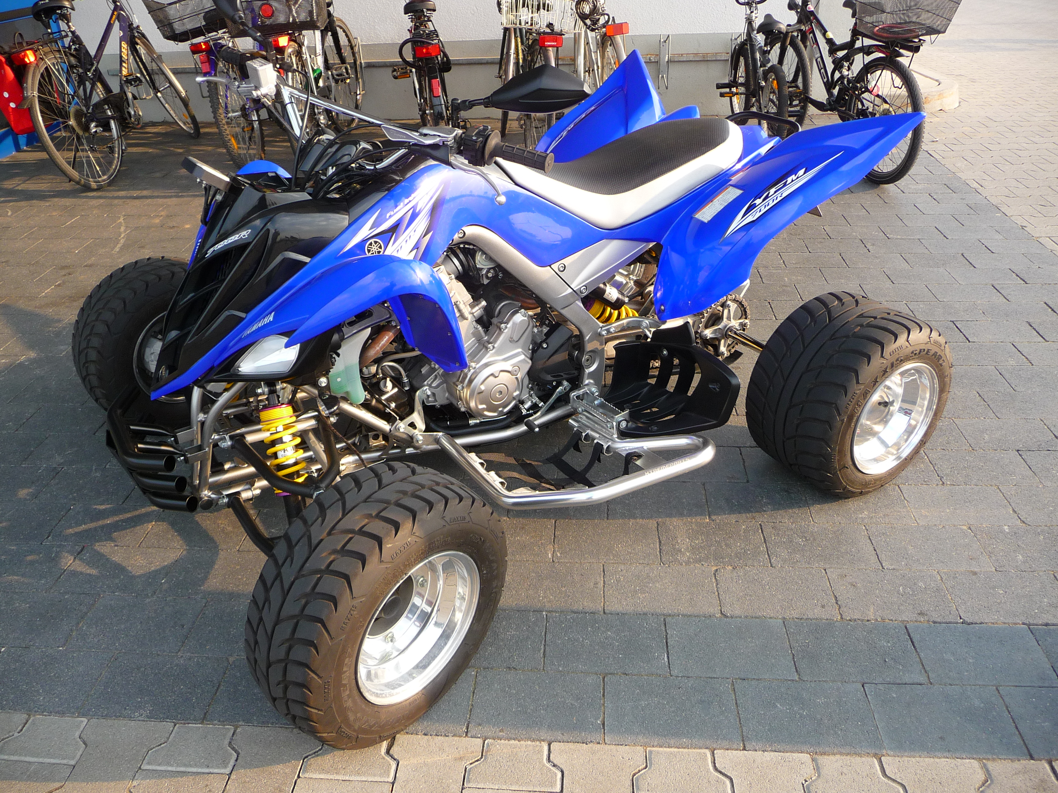 Yamaha Raptor YFM 700R, fotografiert in Baden-Württemberg (Deutschland)